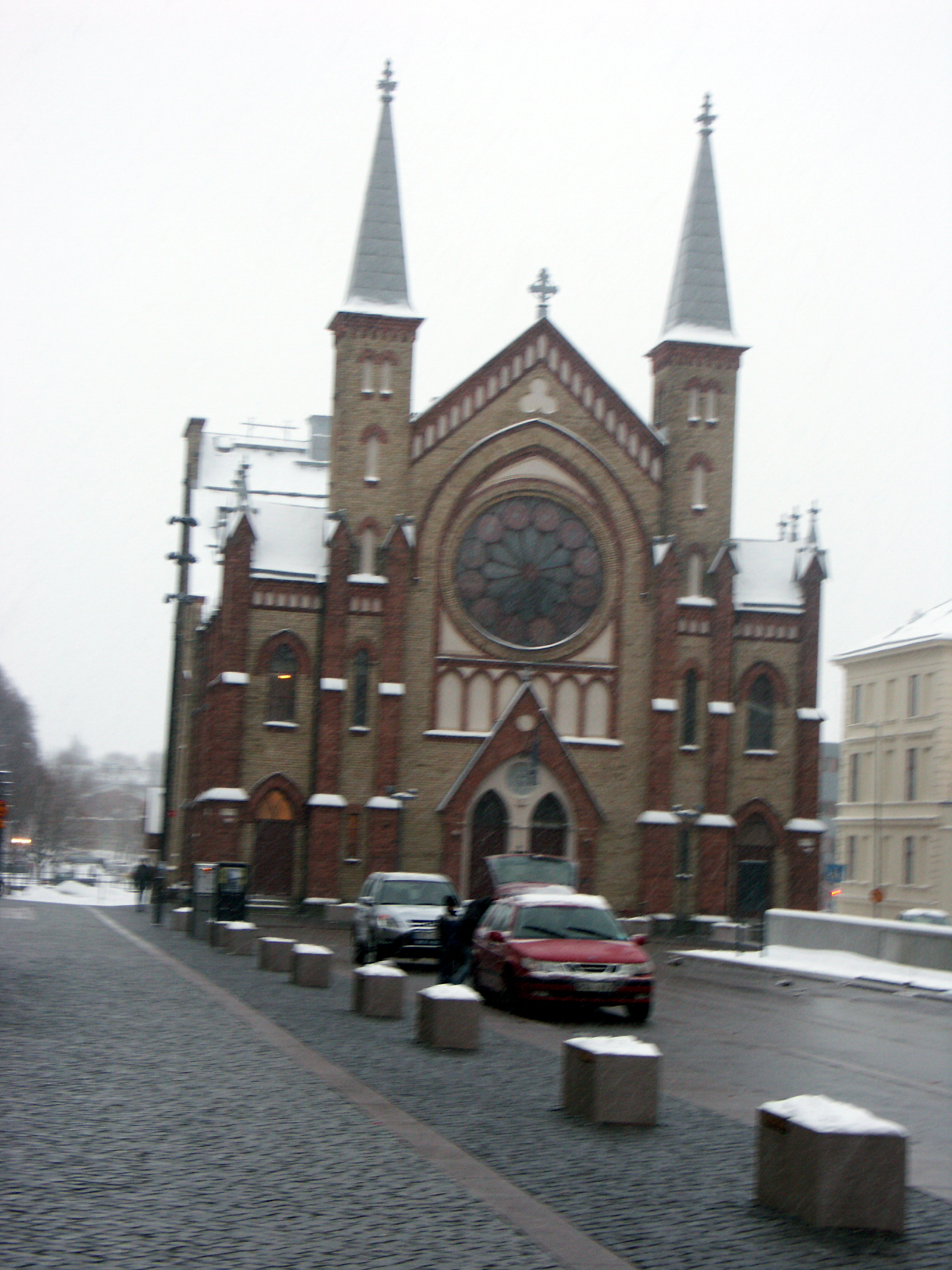 Sjömanskyrkan i Gäve, starx utanför centralstationen